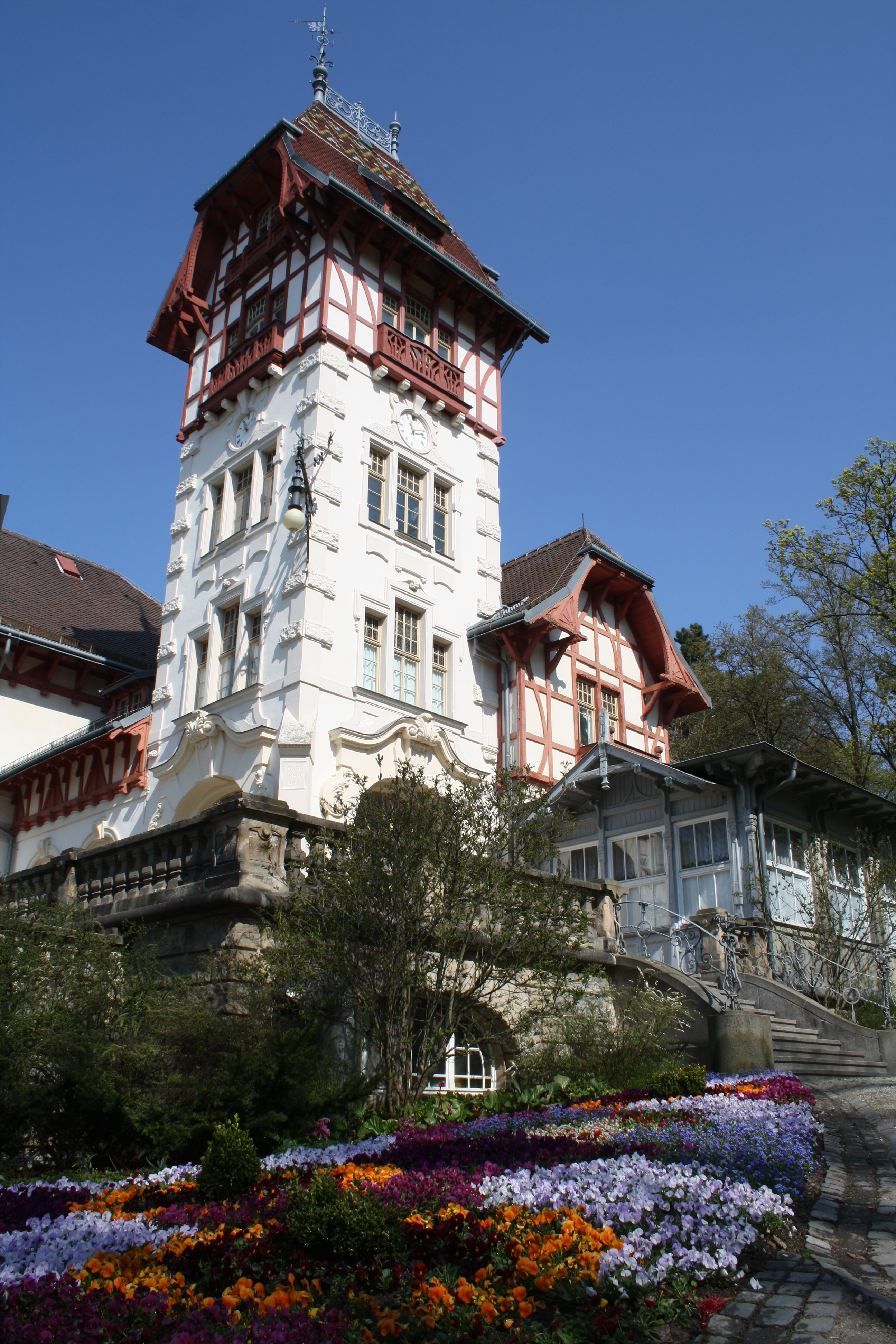 Stadtpark Theresienstein in Hof